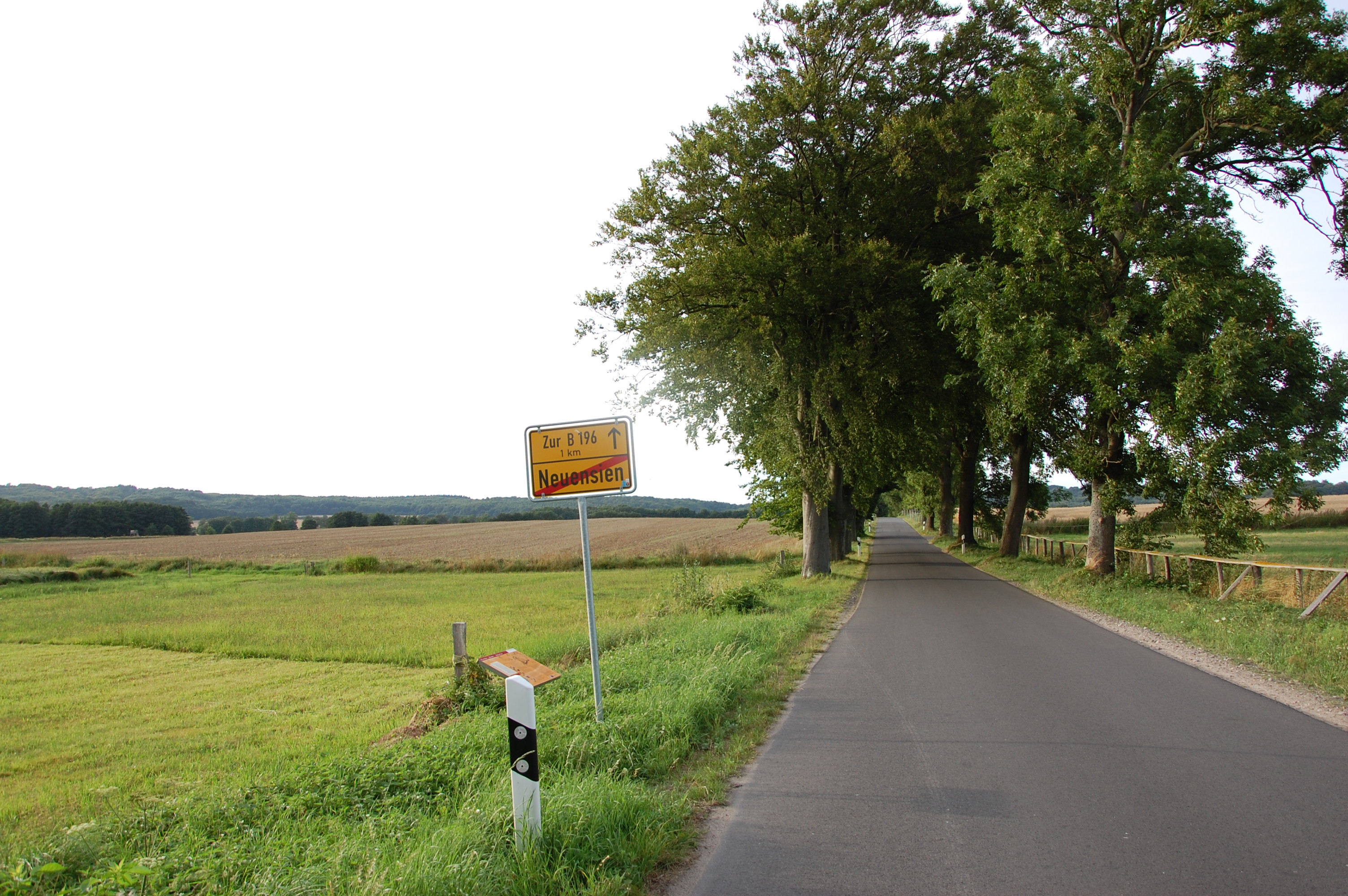 wüster Hof Leistin nördlich Neuensien